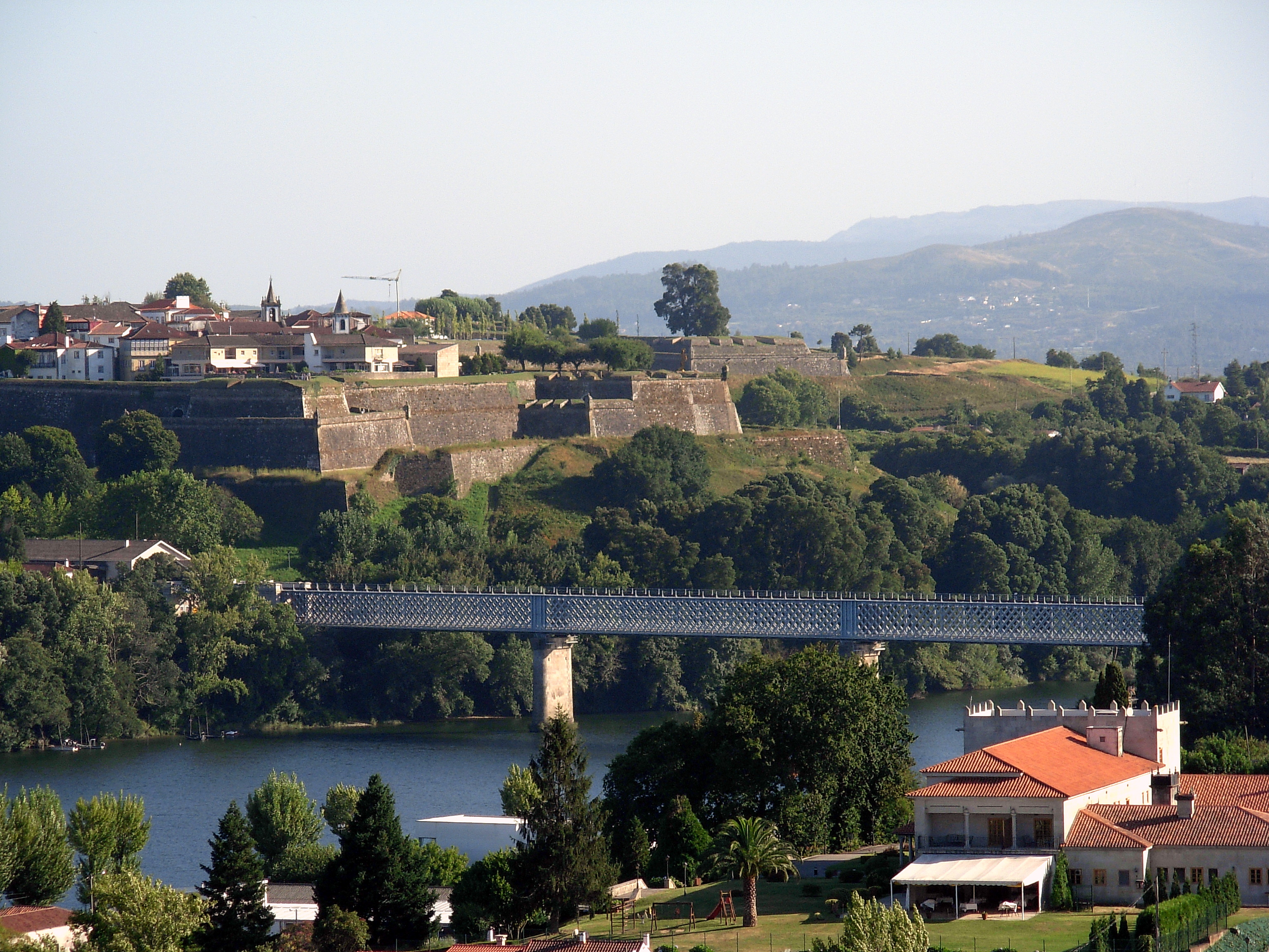 Arriba á esquerda fortaleza de Valença do Minho. No cento da imaxe a Ponte Vella sobre o río Miño. Abaixo á dereita o Parador de Tui.